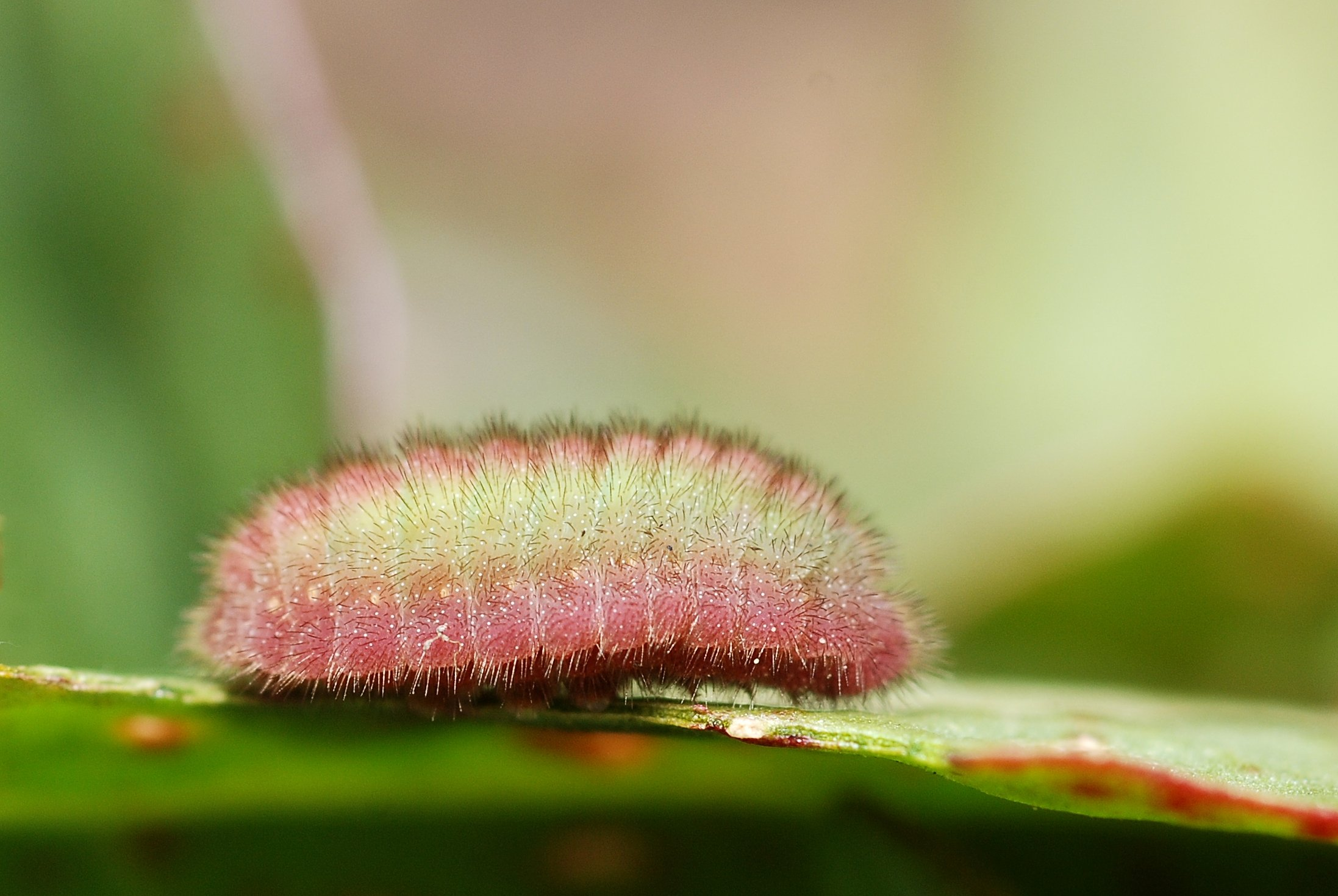 Lycaena phlaeas caterpillar on Rumex acetosella